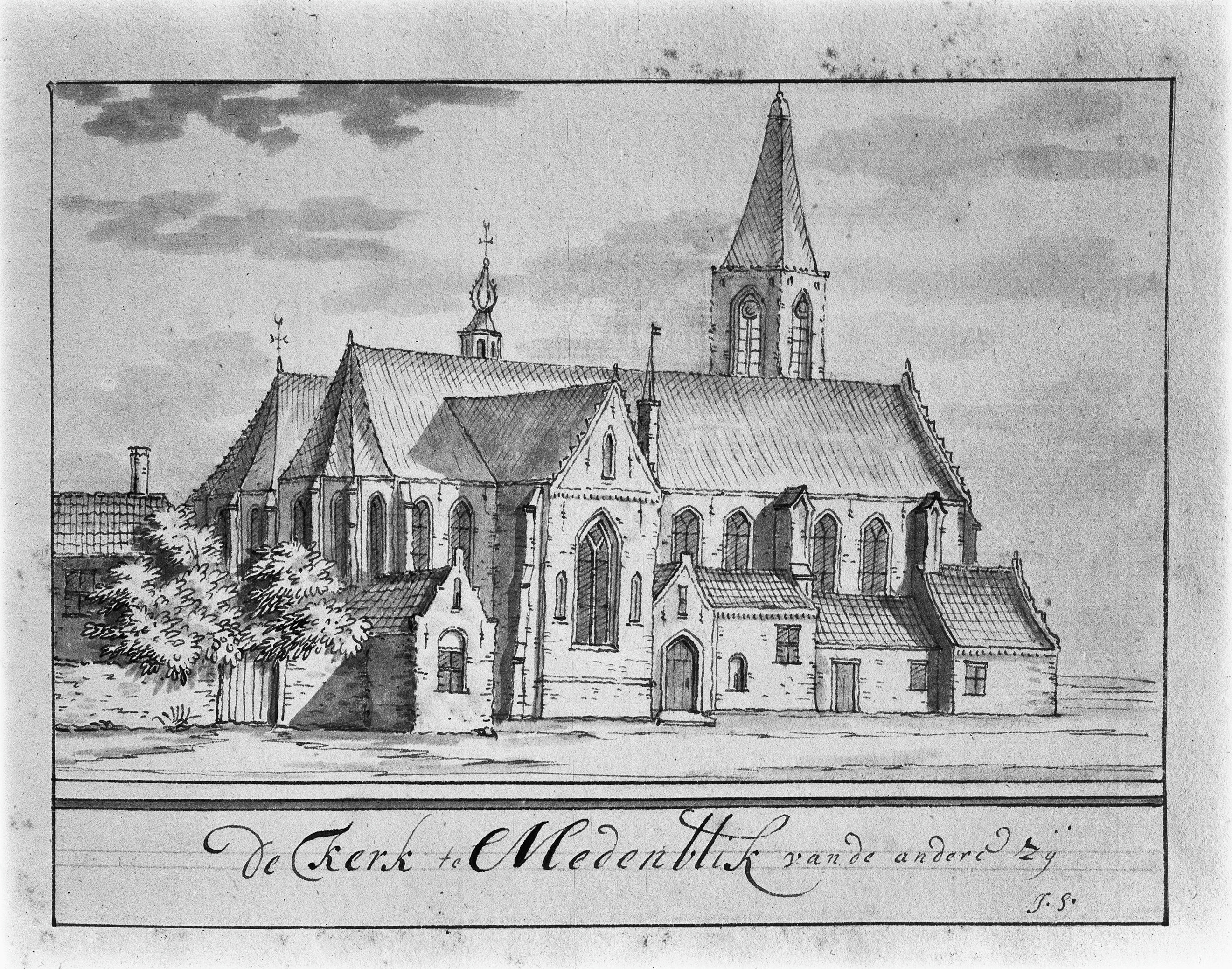 Hervormde kerk en Toren: kerk vanuit het noorden